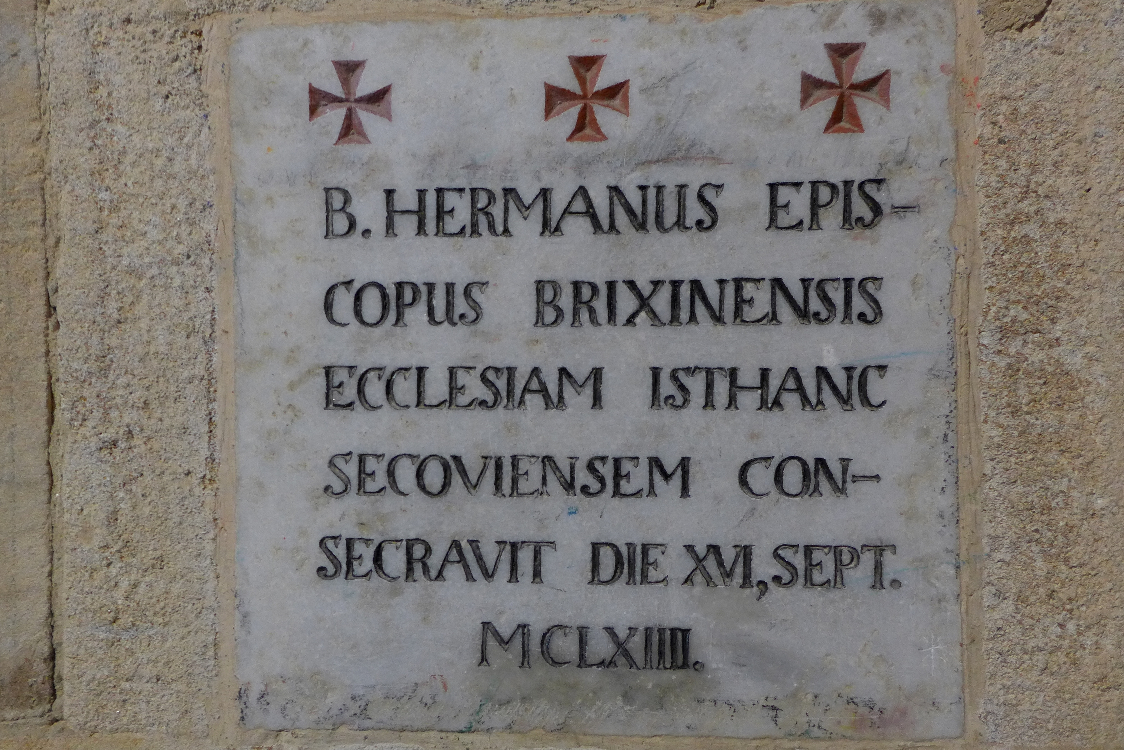 Basilika Seckau, Gedenktafel zur Einweihung der Kirche, 16. September 1164; die Tafel befindet sich in der Vorhalle der Basilika.